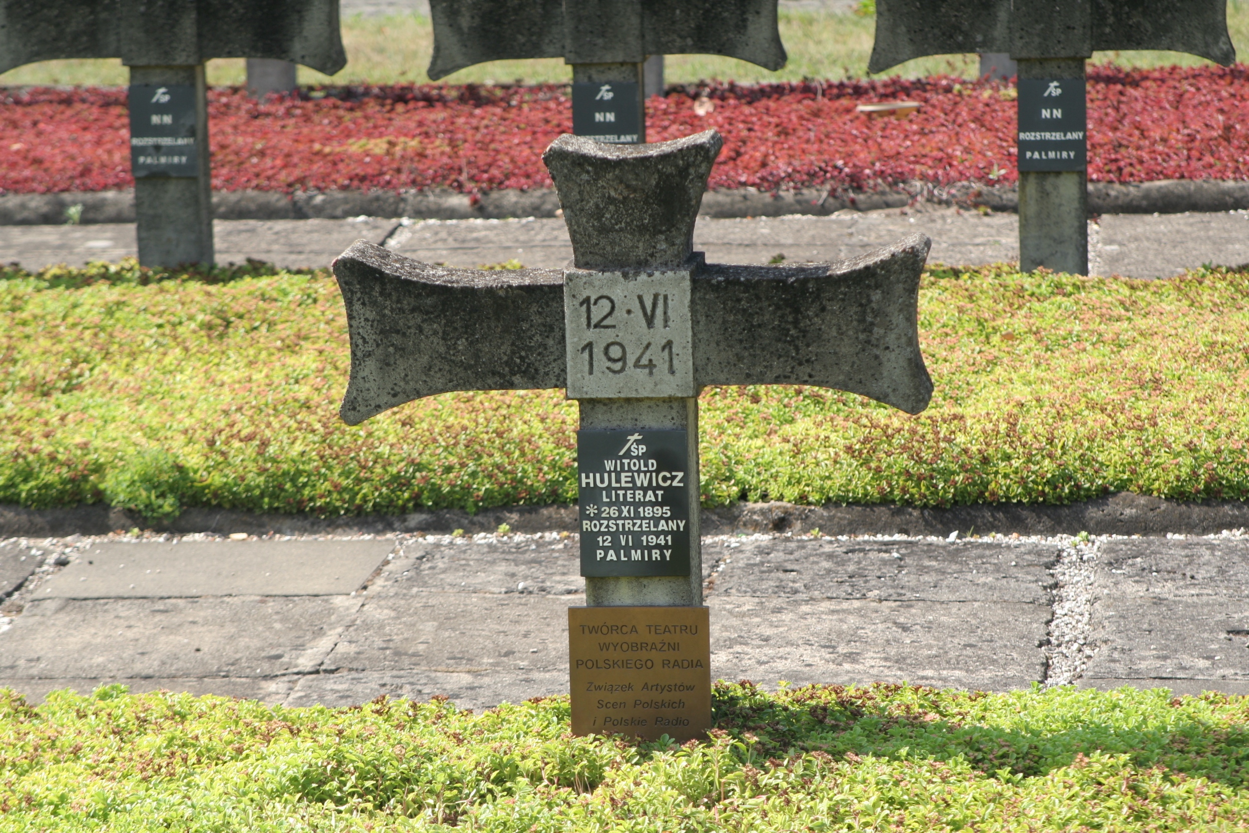 Muzeum w Palmirach pod Warszawą.